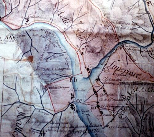 Mappa di Pallare del 1771, conservata presso l'archivio di stato di Torino